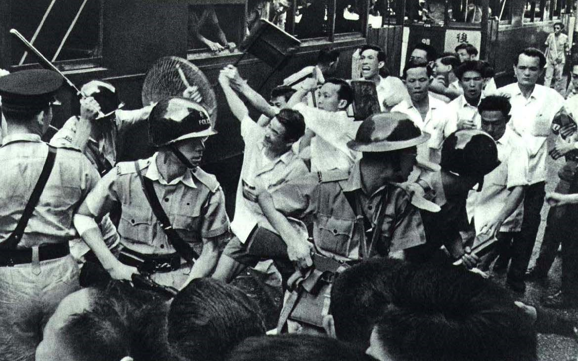 1967-08 1967年 香港电车工人罢工